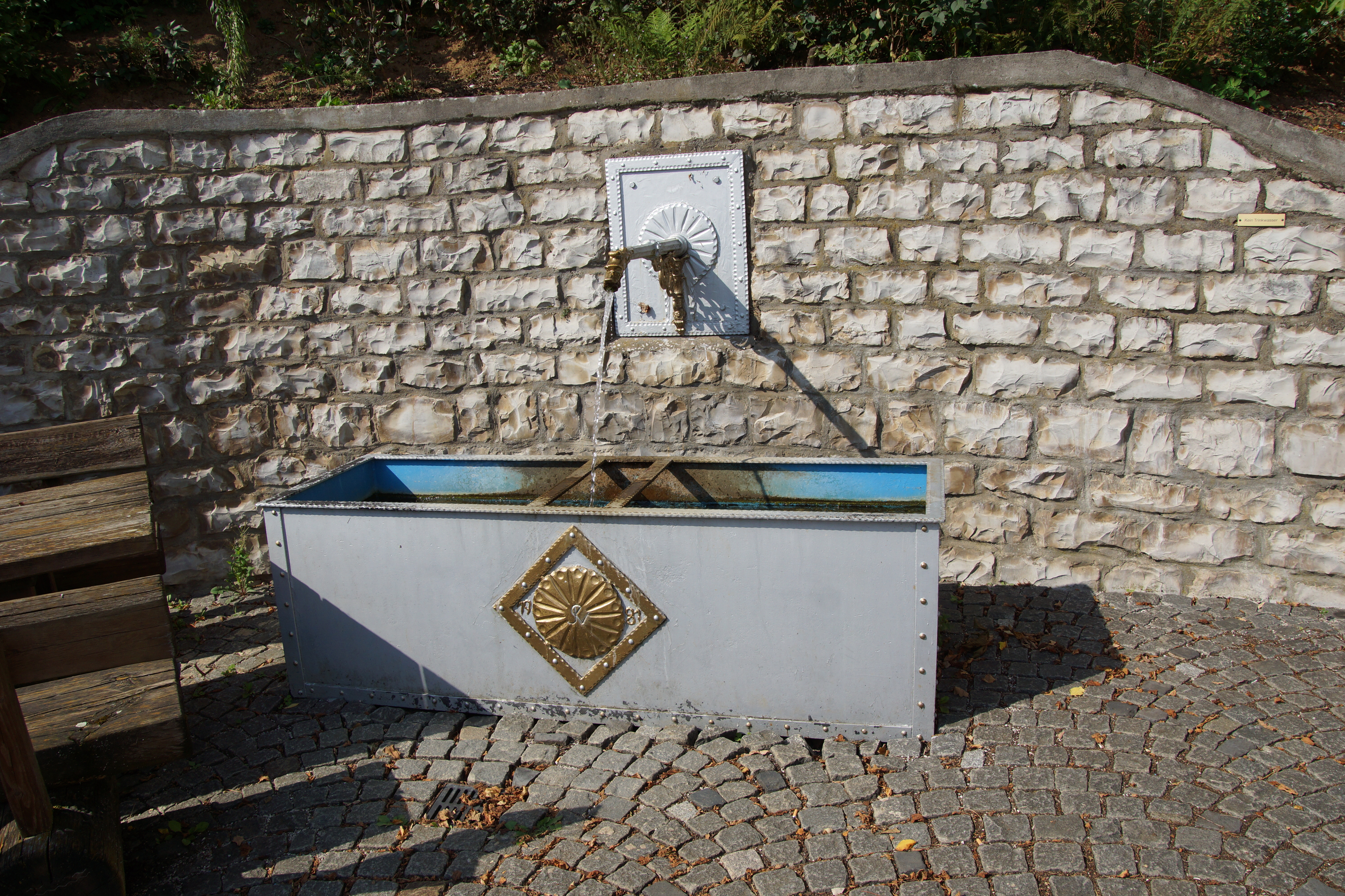 Brunnen in Oberrohrenstadt bei Berg in der Oberpfalz